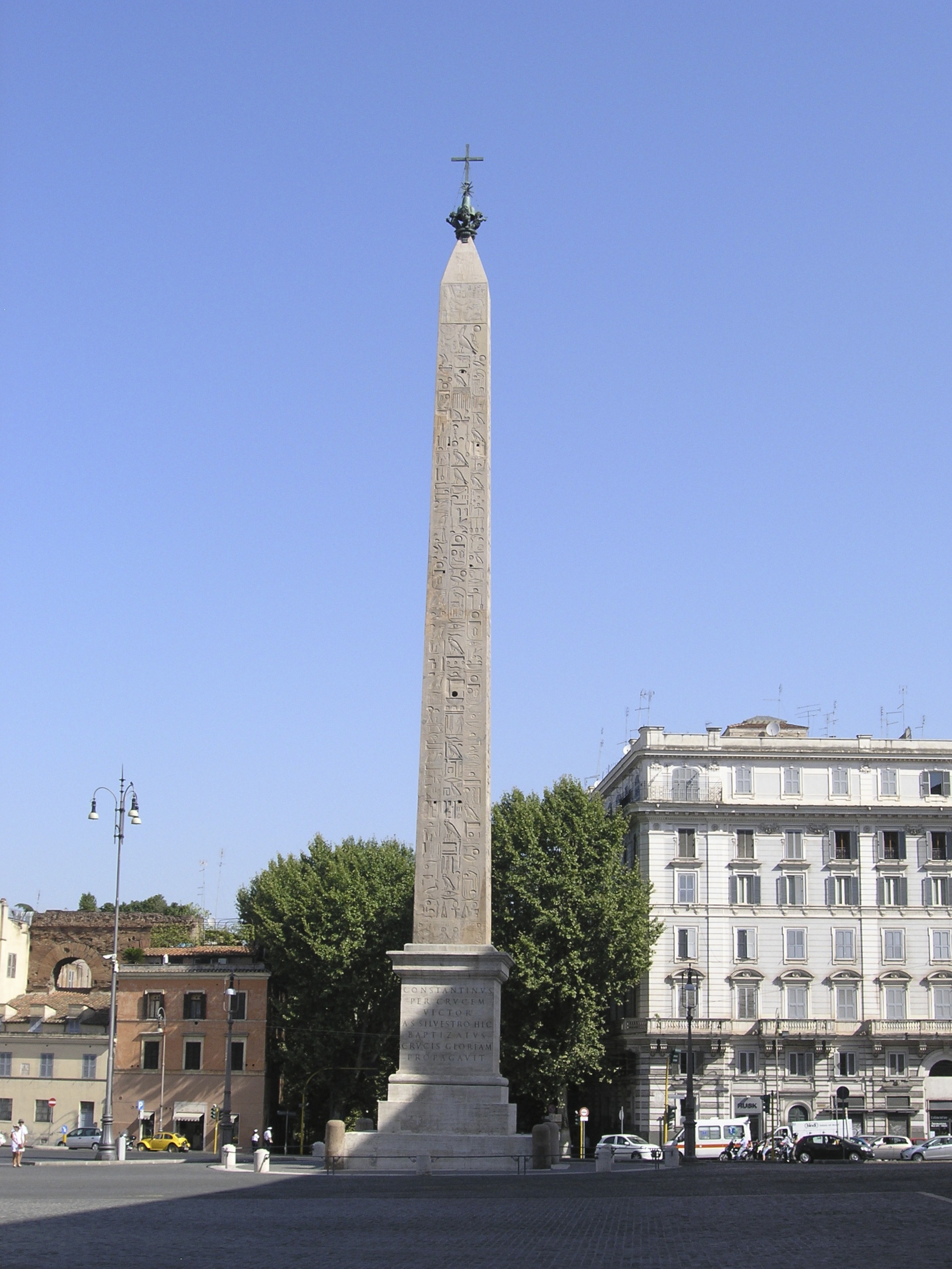 Der Obelisk im Lateran in Rom.